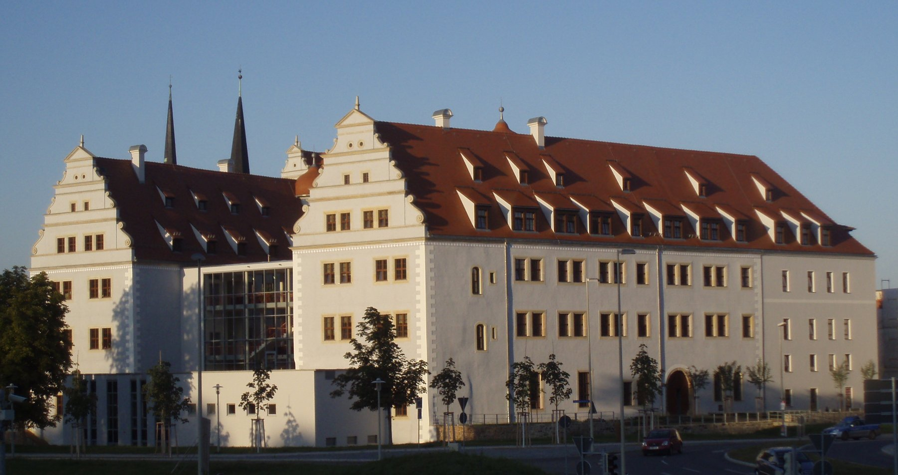 Rekonstruiertes Schloss Osterstein in Zwickau am 2009-09-08